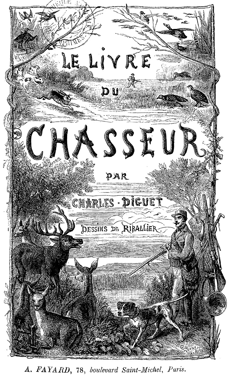 Le Livre du Chasseur éditions Fayard 1881, auteur Charles Diguet, illustrateur Henri Riballier-Chouppe. Frontispice page 3.